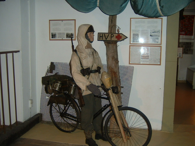 Kurier mit Panzerfaust am Fahrrad, 2. Weltkrieg, im National Museum of Military History in Diekirch in Luxembourg (Luxembourg)